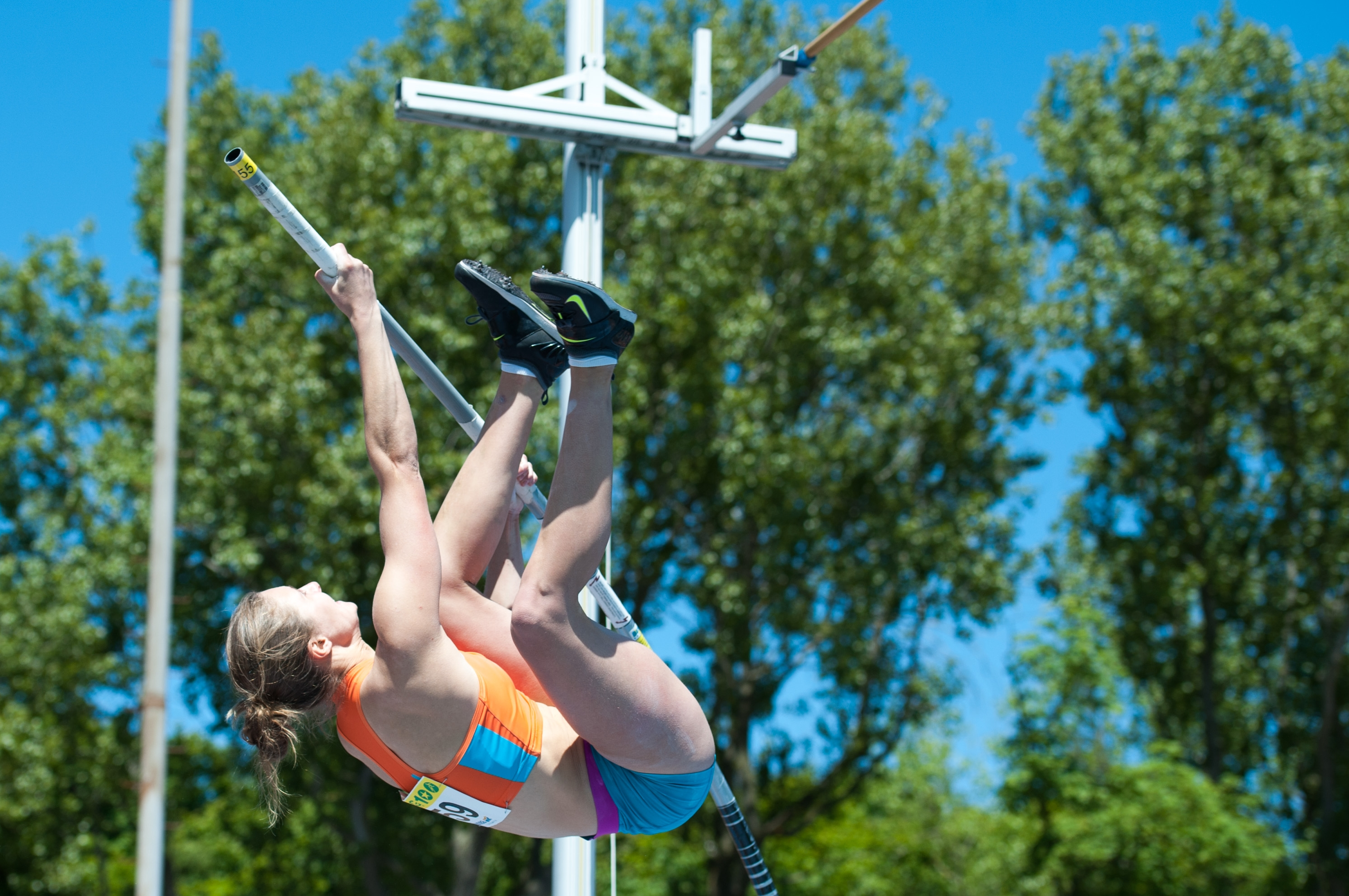 Fanny Smets in actie tijdens het NK teams 2013.